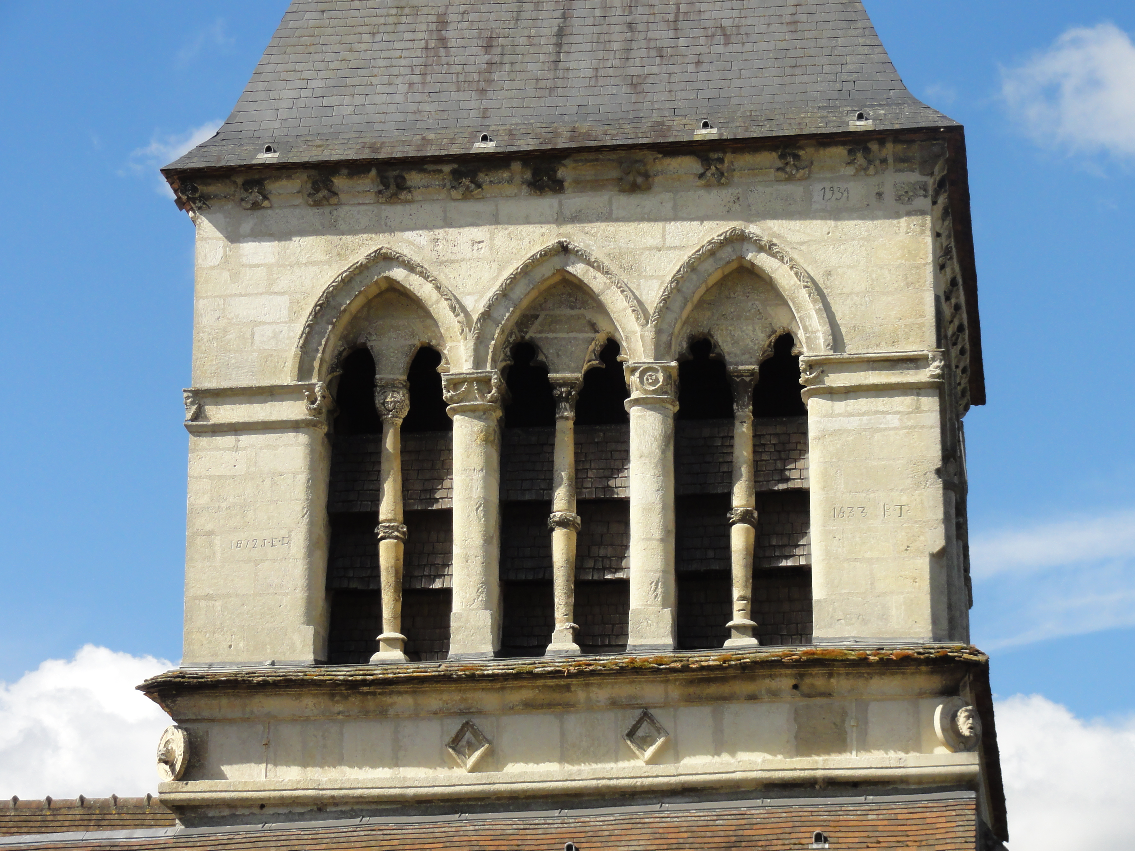 Église Saint-Étienne de Clairoix (voir titre).